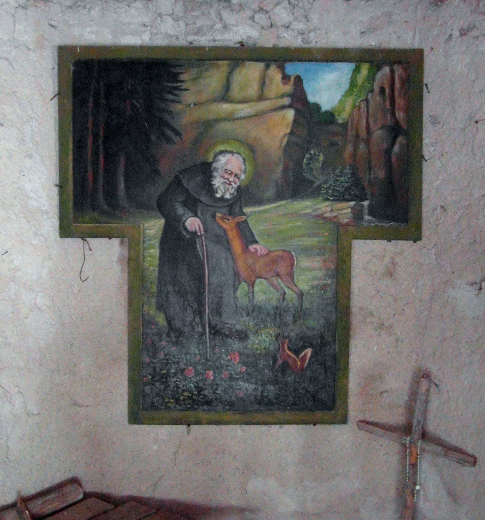 Santuario di Pietralba - Eremo